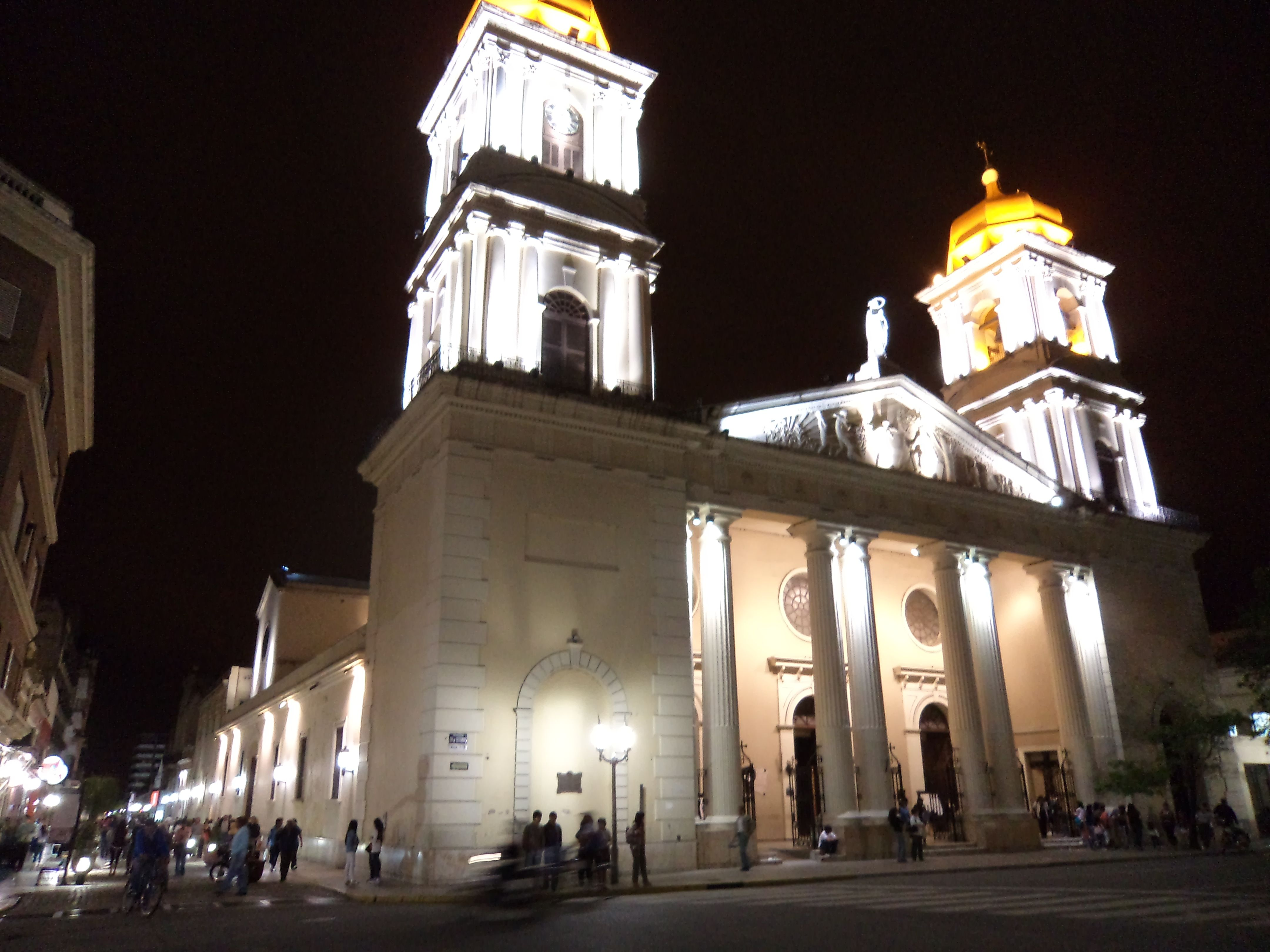 Catedral de San Miguel de Tucumán vista nocturna